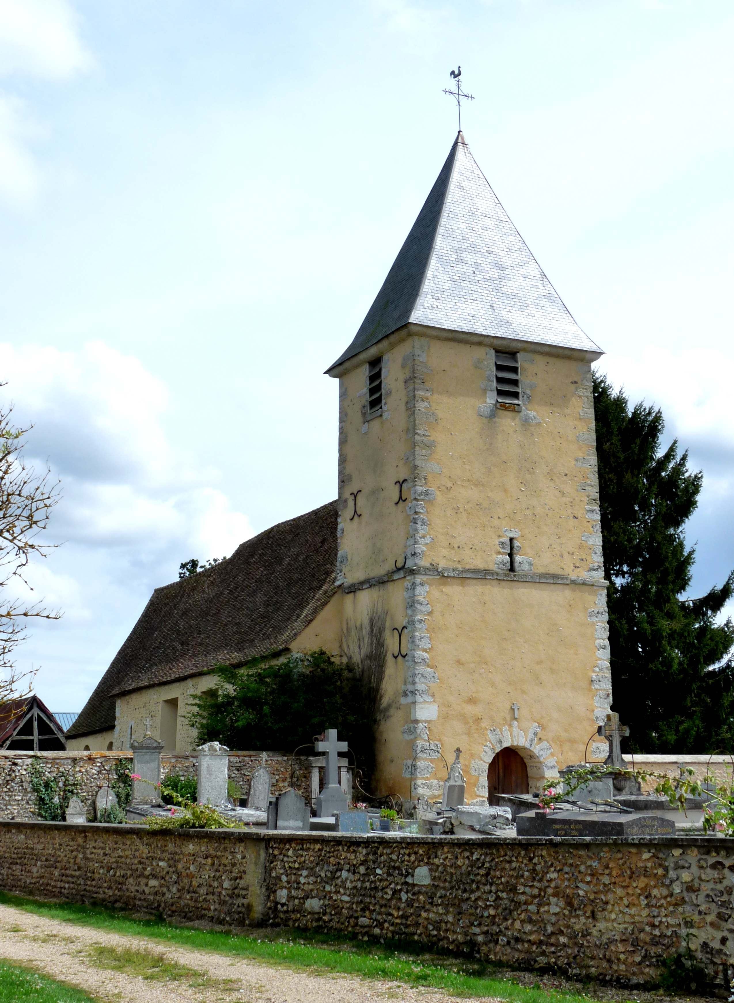 Église Saint-Remy de Serez .